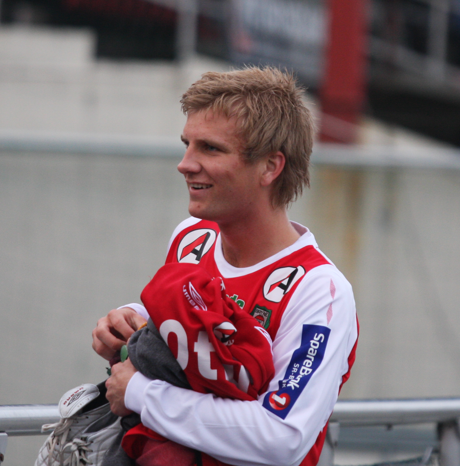 Sverre Larshus Larsen at Bryne stadion